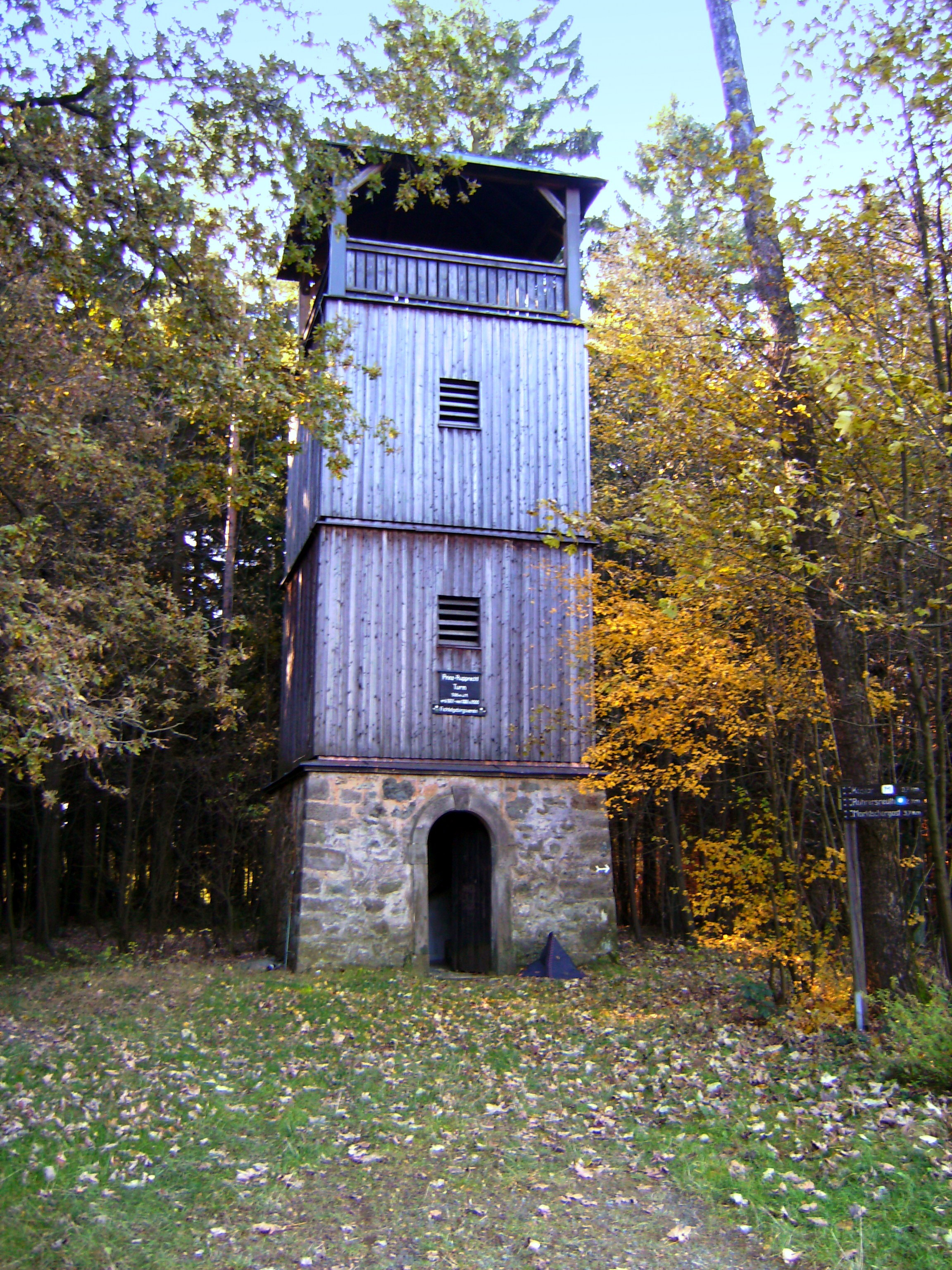 Prinz-Rupprecht-Turm